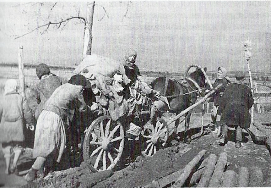 Всей семьёй в колхоз. весна 1930.